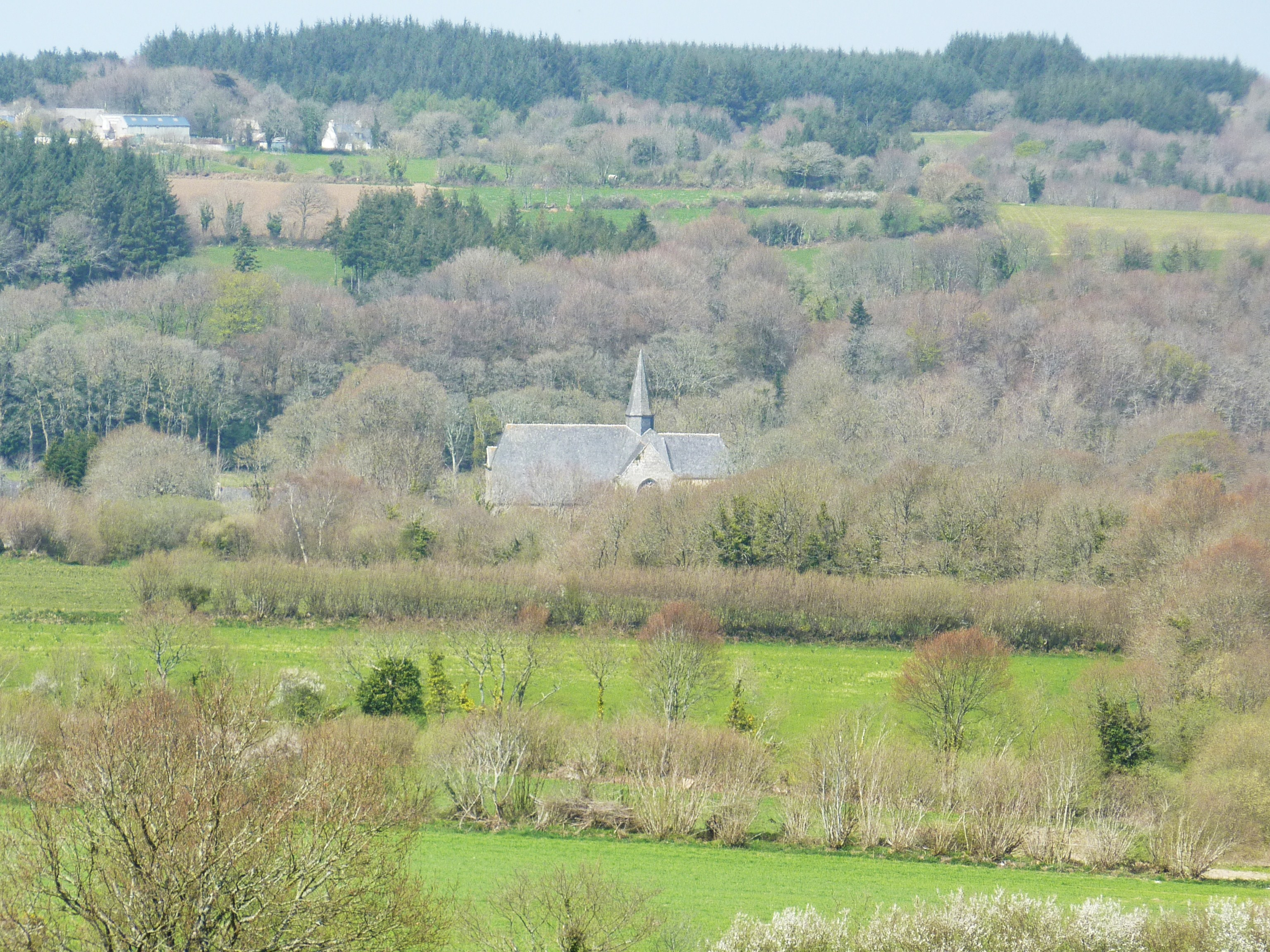 Abbaye du Relec. Vue générale du site